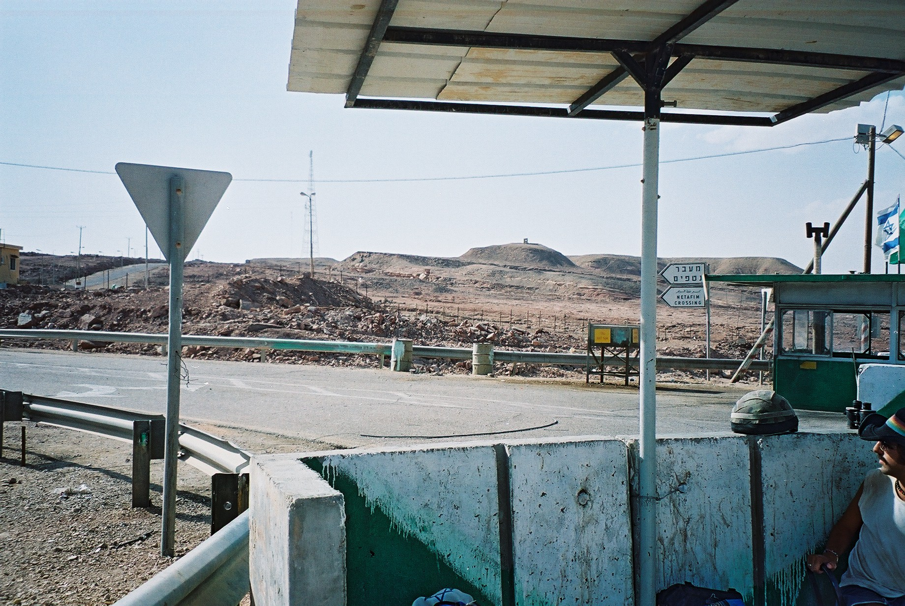 מעבר גבול נטפים